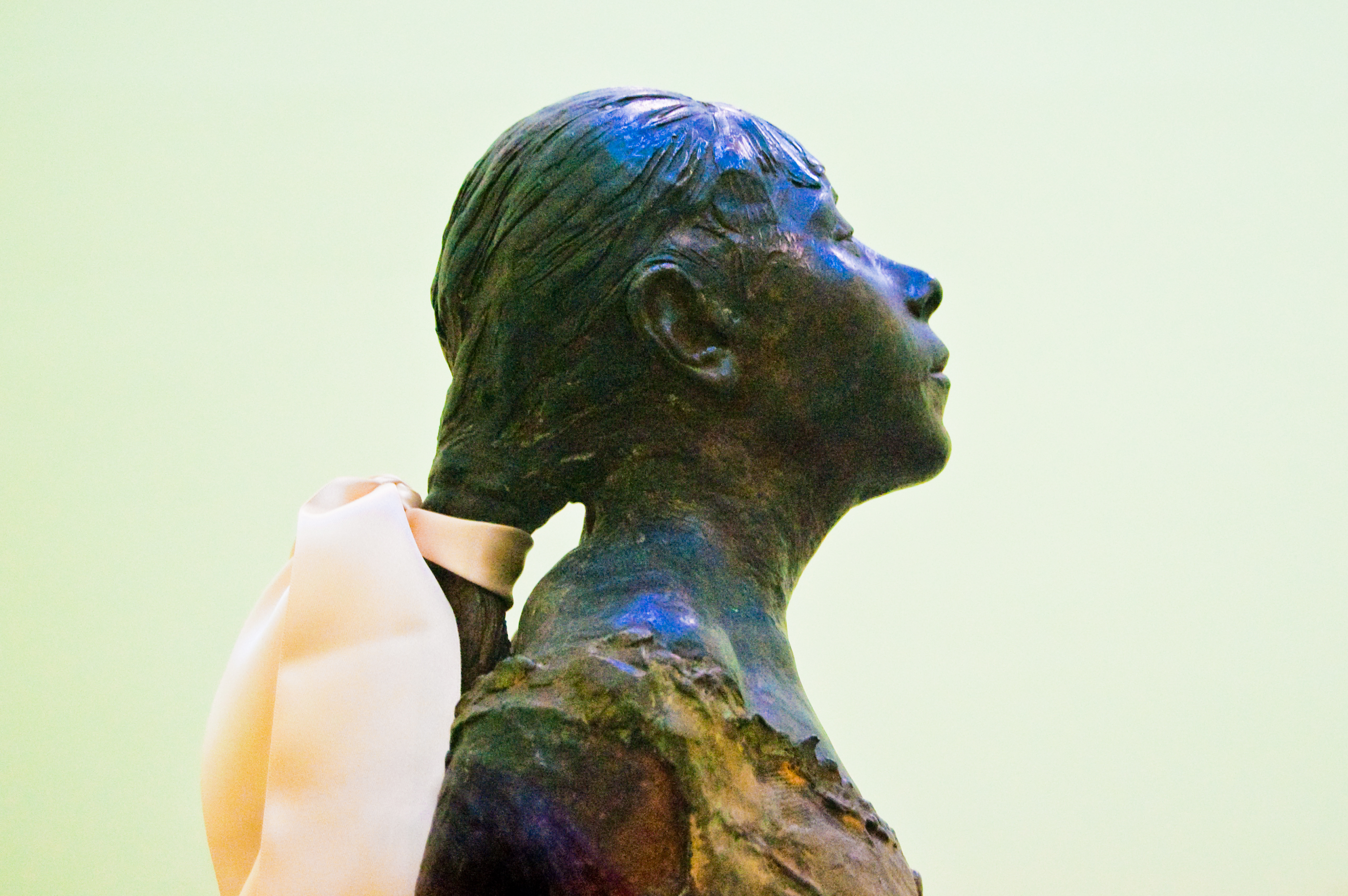 ballet dancer - detail